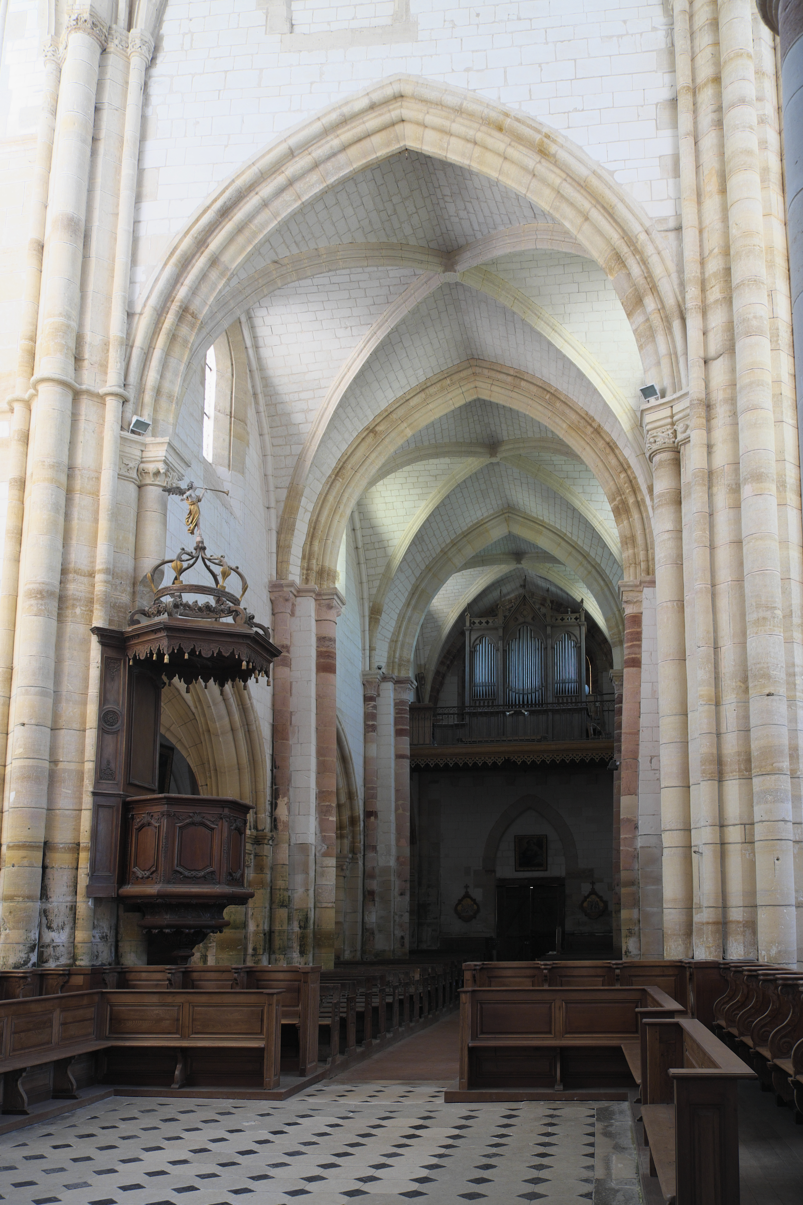 Katholische Pfarrkirche Saint-Amand in Saint-Amand-sur-Fion im Département Marne in der Region Grand Est/Frankreich, Langhaus